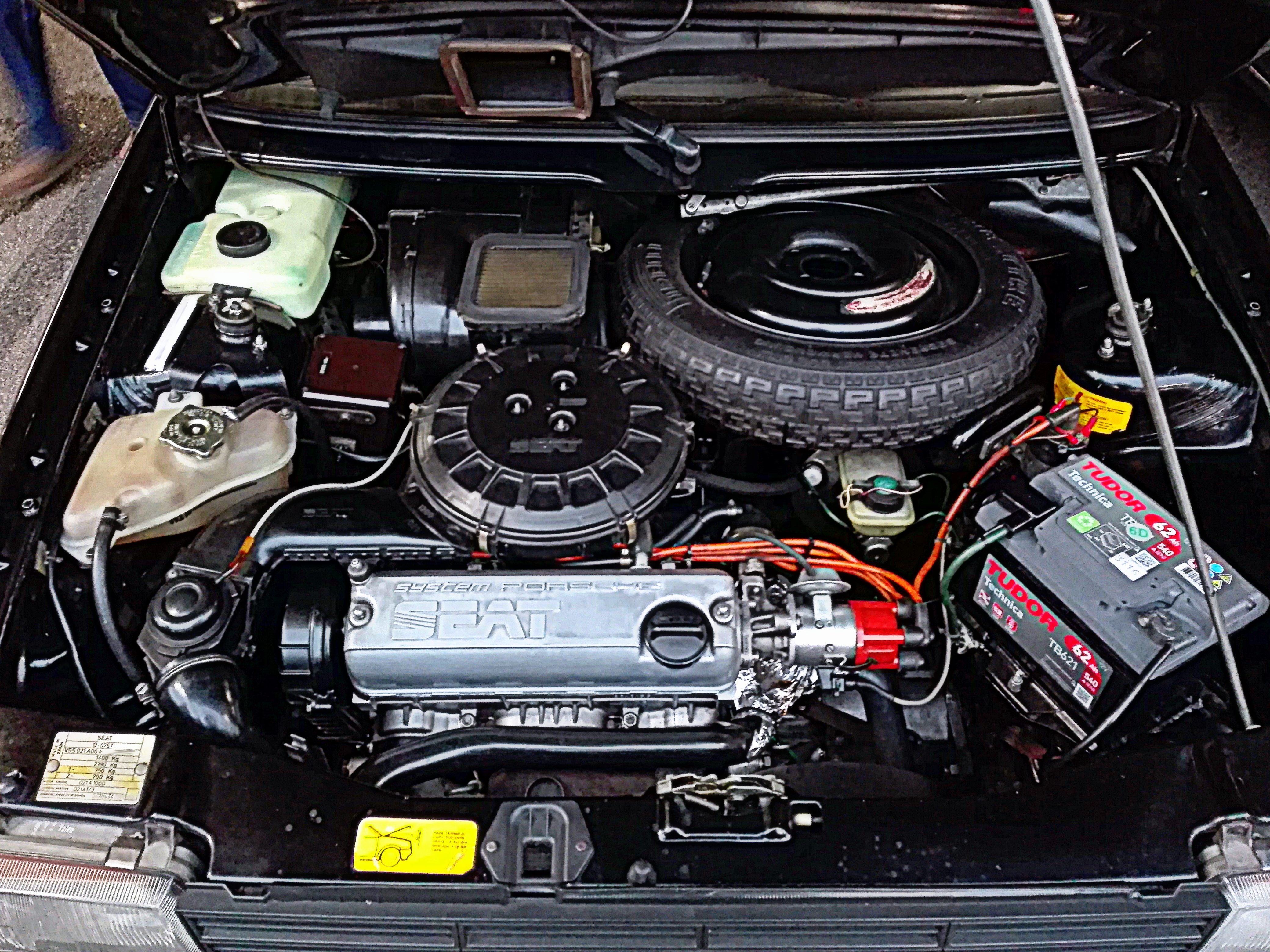 SEAT Ibiza 1.2 System Porsche Engine 1986